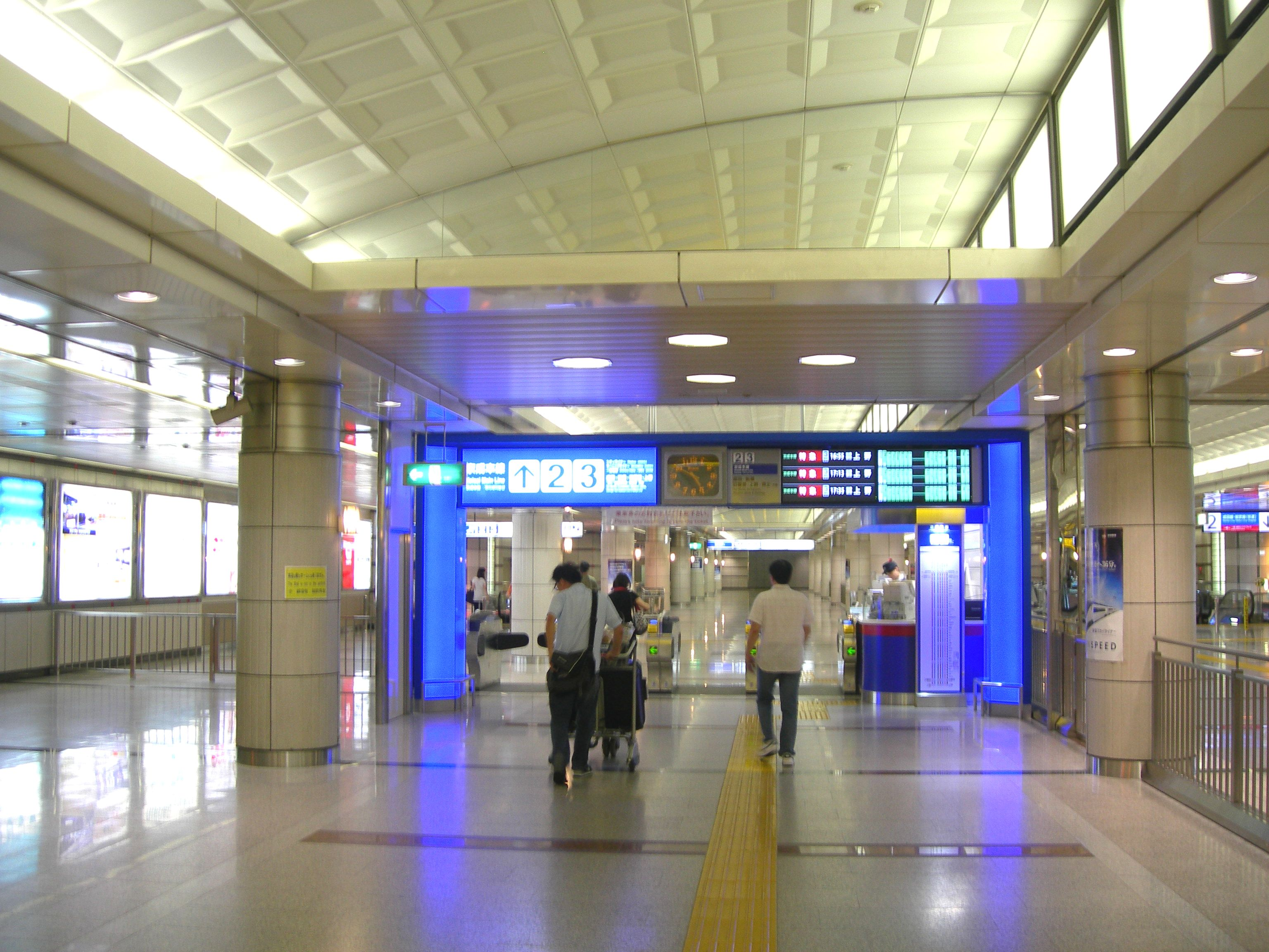 京成電鉄 成田空港駅京成本線コンコースの中間改札